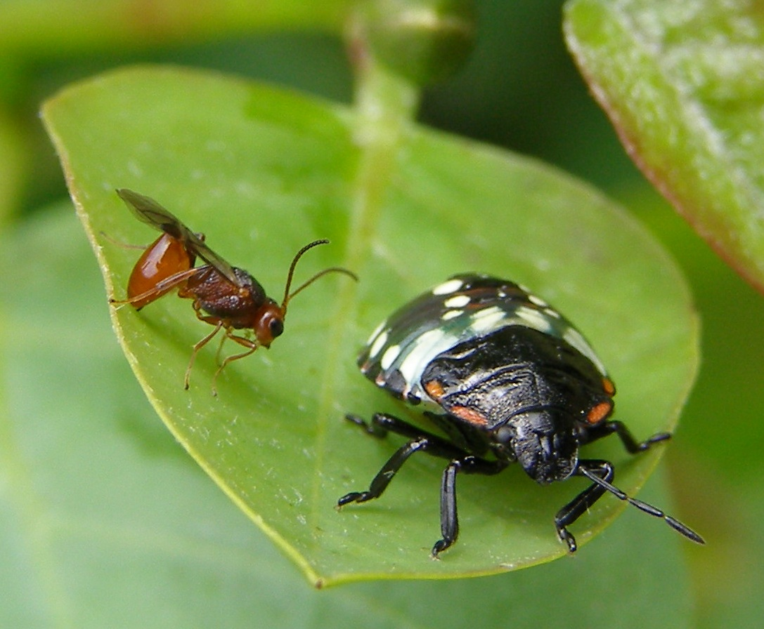 Aridelus rufotestaceus (Braconidae, Euphorinae) femelle s'apprêtant à pondre dans un jeune Nezara viridula sur câprier (Capparis sp)